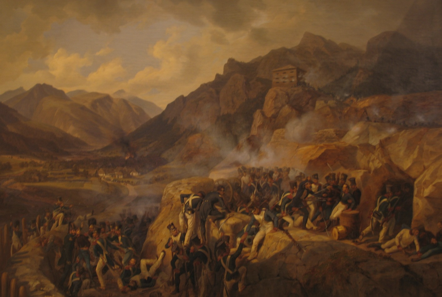 Die Verteidigung des Blockhauses von Malborgeth und der Heldentod des Kommandanten der Besatzung k.k. Hauptmann Friedrich Hensel am 17. Mai 1809